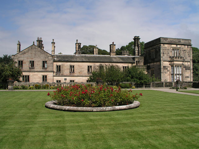 Ilam Hall